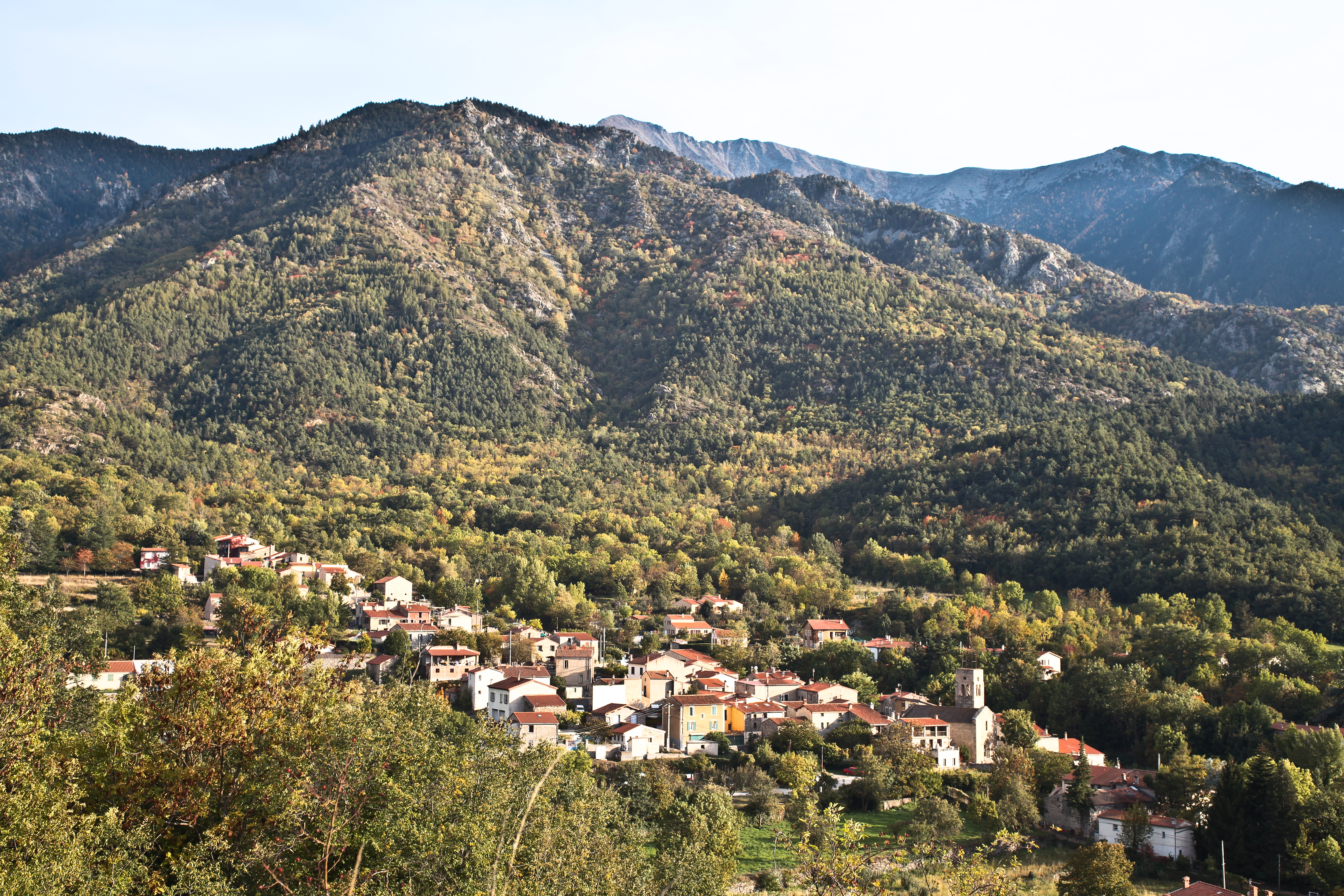 Vue générale du village de Fillols